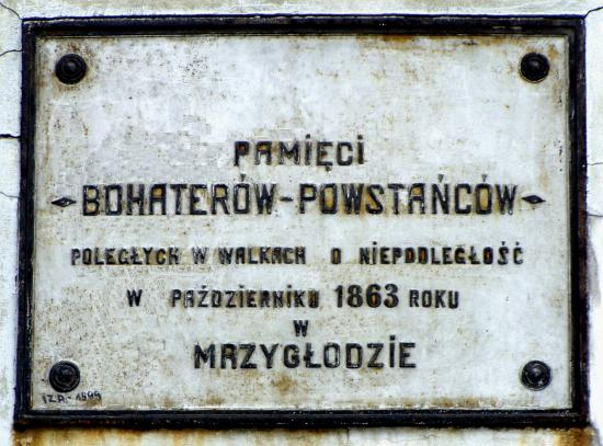 Tablica pamiątkowa bohaterów poległych w postaniu styczniowym na terenie Mrzygłodu